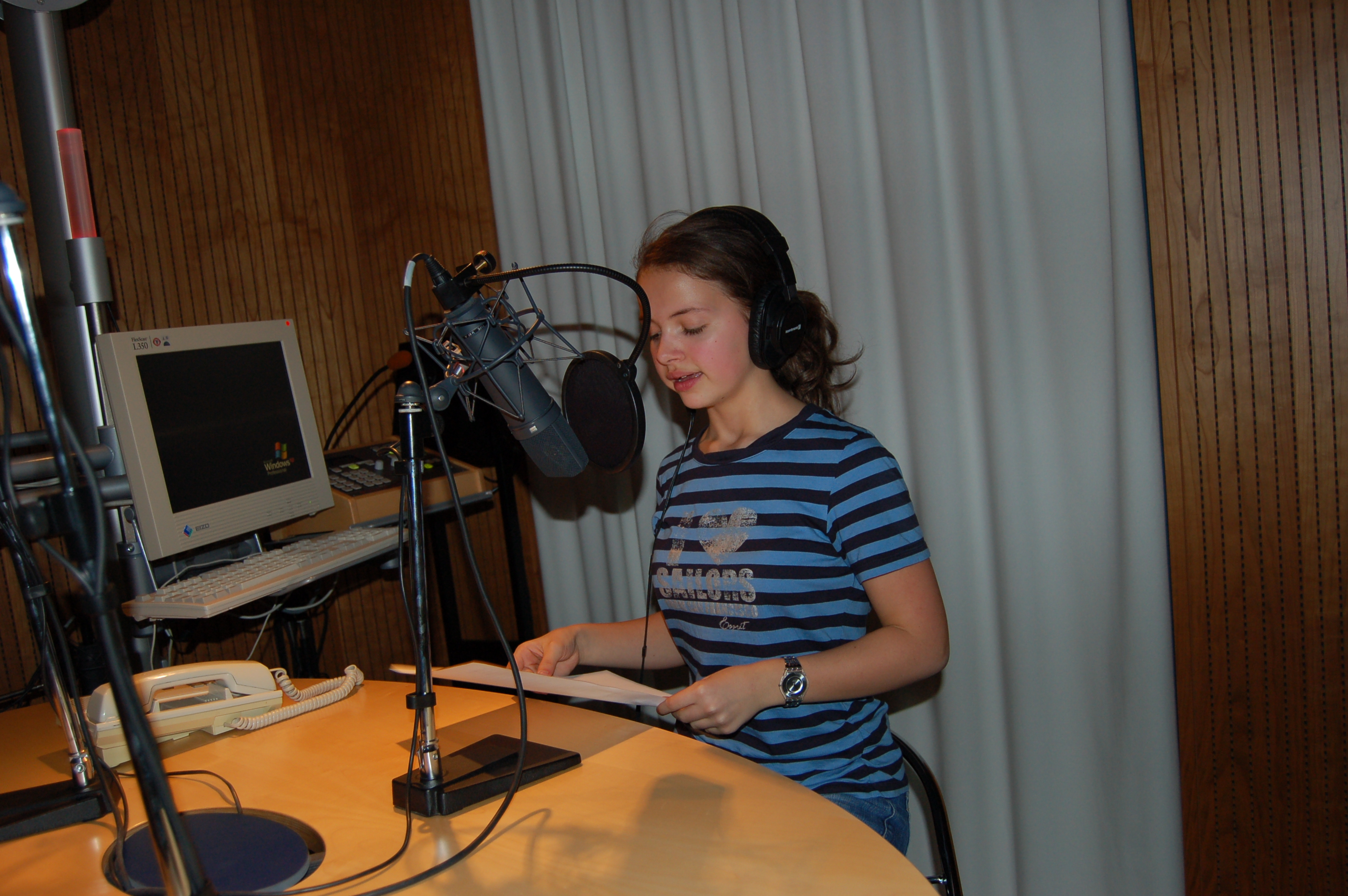 Synchronsprecherin Friedel Morgenstern